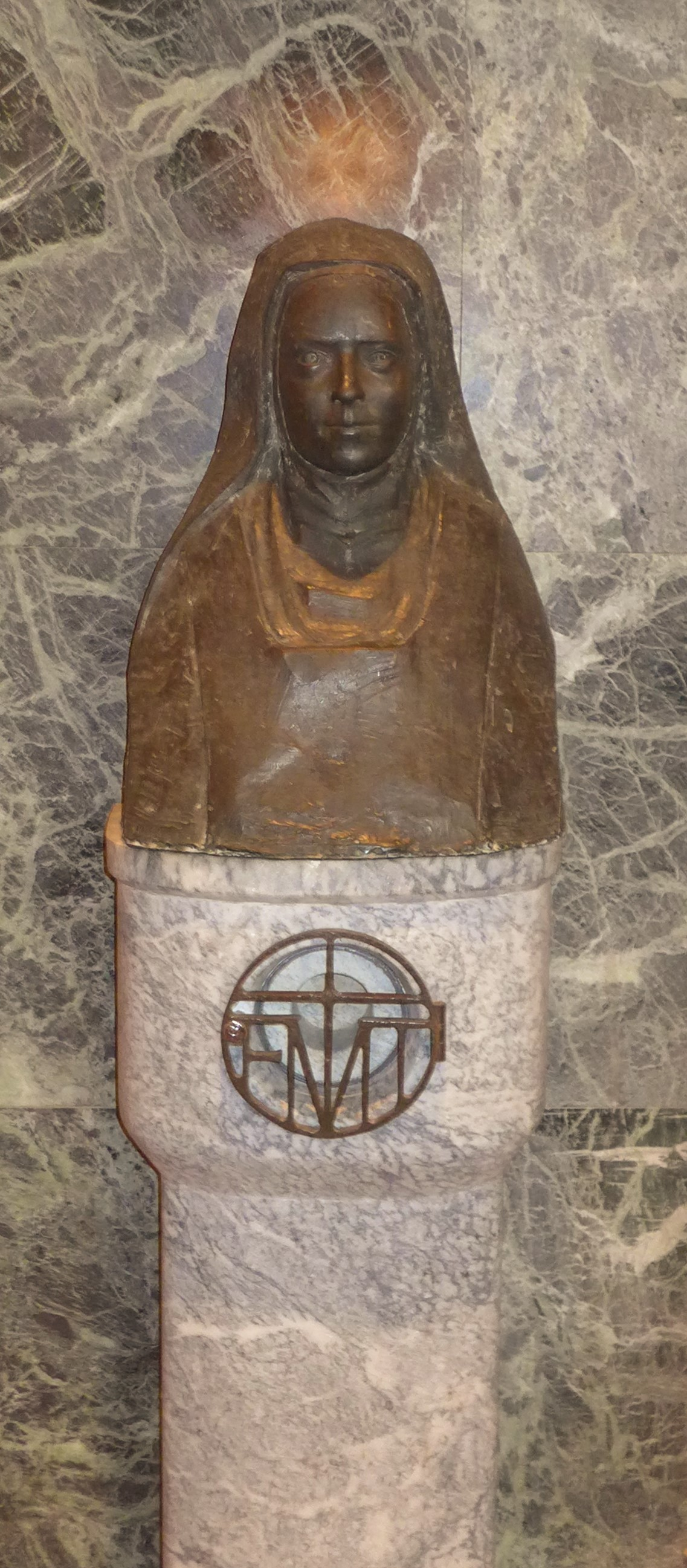 Christkönig-Kirche (Saarbrücken), Thérèse von Lisieux